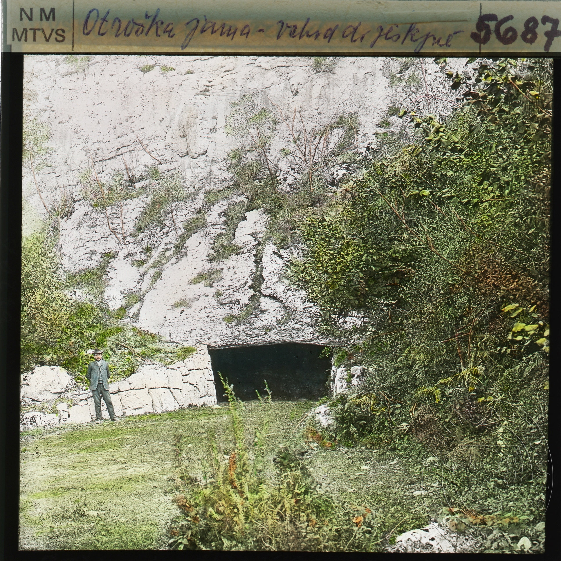 Otoška jama.